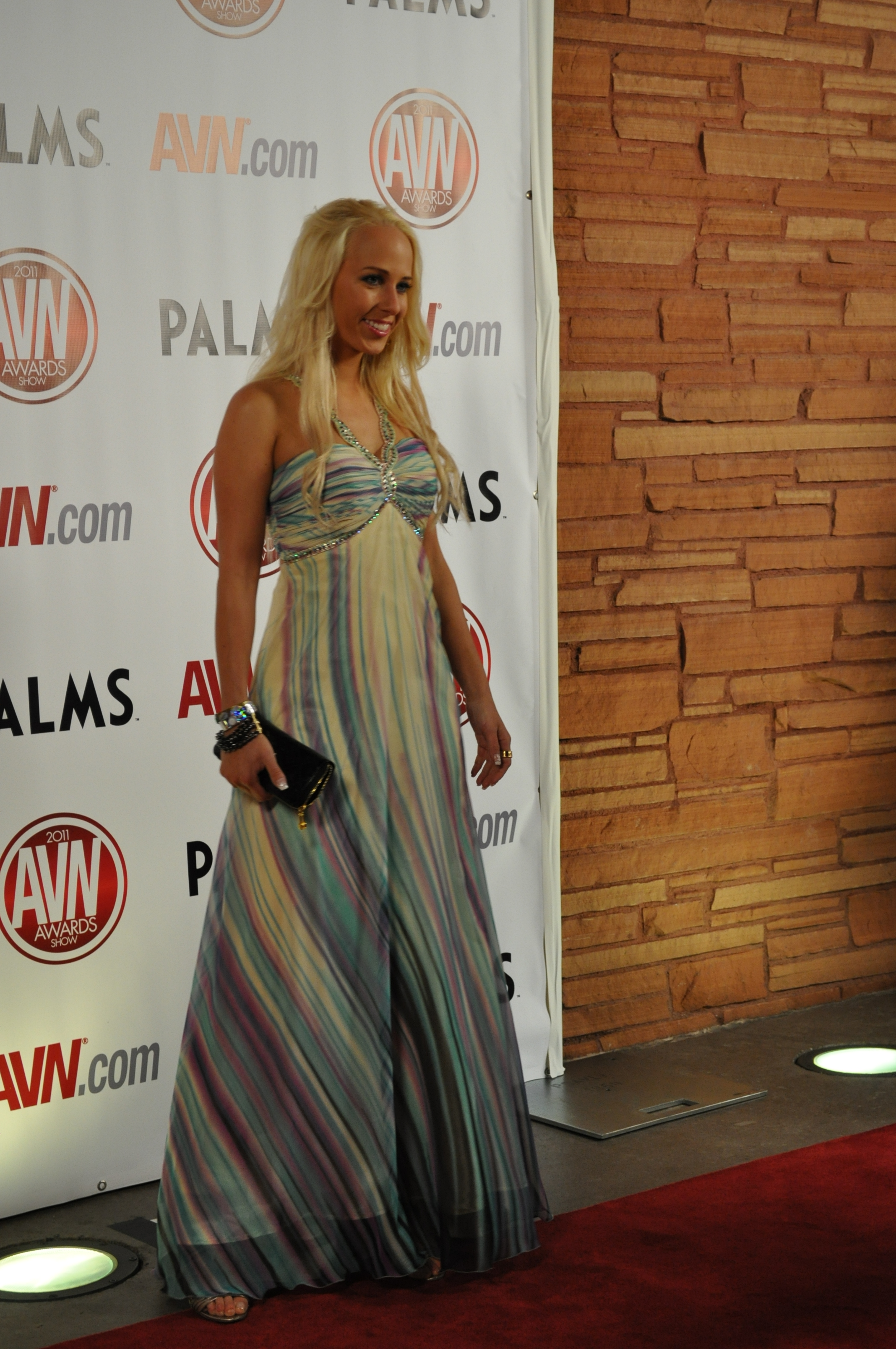 Carla Cox at AVN Awards 2011